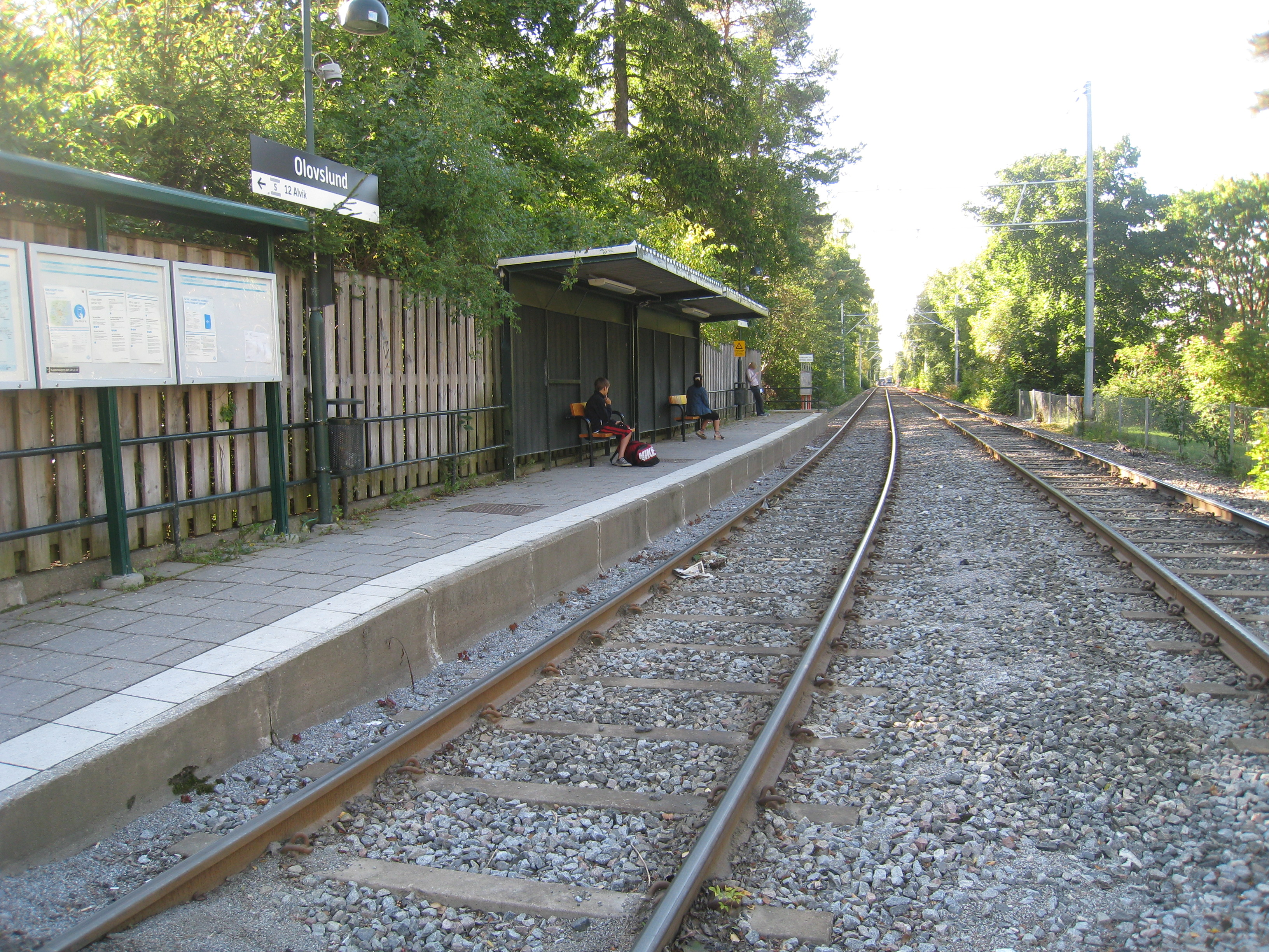 Olovslunds spårvagnshållplats inom stadsdelen Nockeby på Nockebybanan, Bromma, Stockholm.